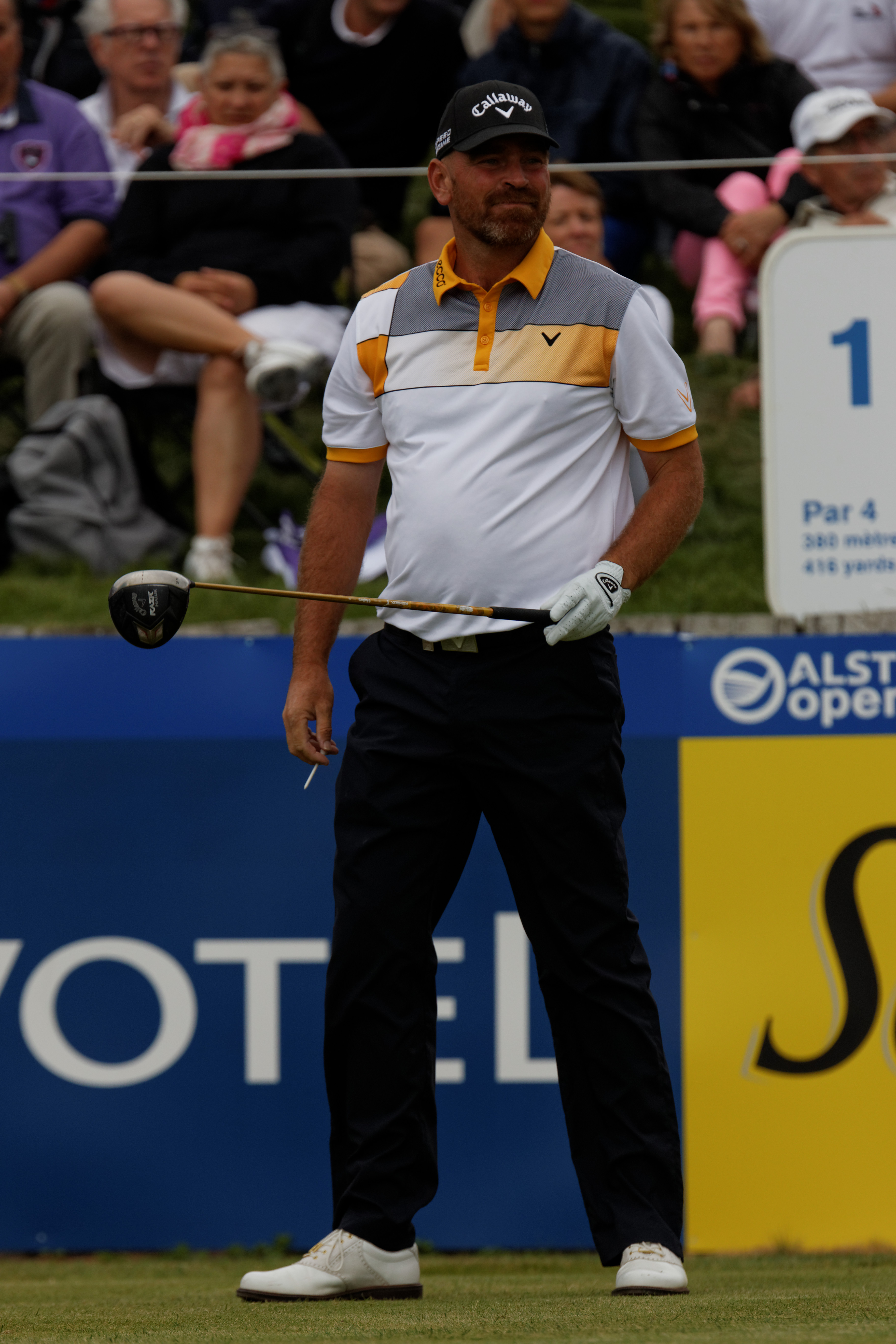 Thomas Björn lors du second tour de l'Open de France 2014 - Golf National - Saint-Quentin-en-Yvelines (78) - départ du trou n° 1